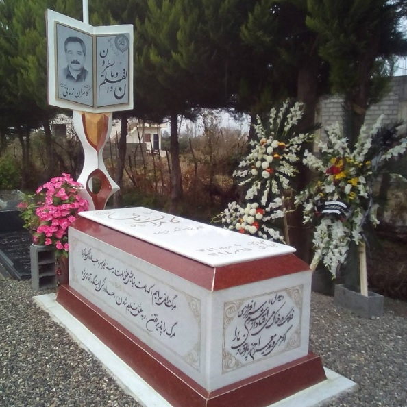 تصویر شماره سه: مزار زنده یاد استاد کامران زمانی نعمت سرا